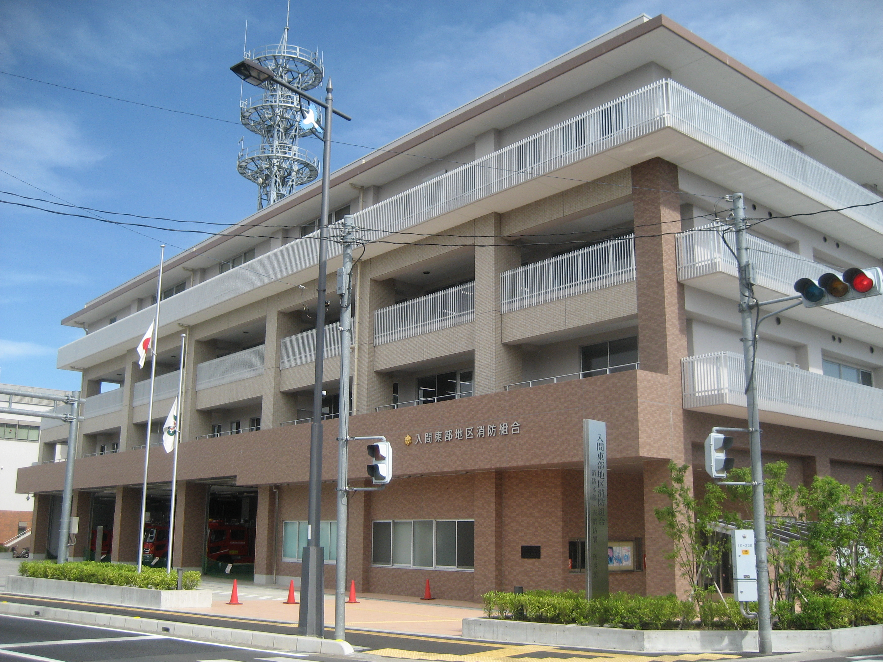 入間東部地区消防組合消防本部・西消防署庁舎（西側から撮影）